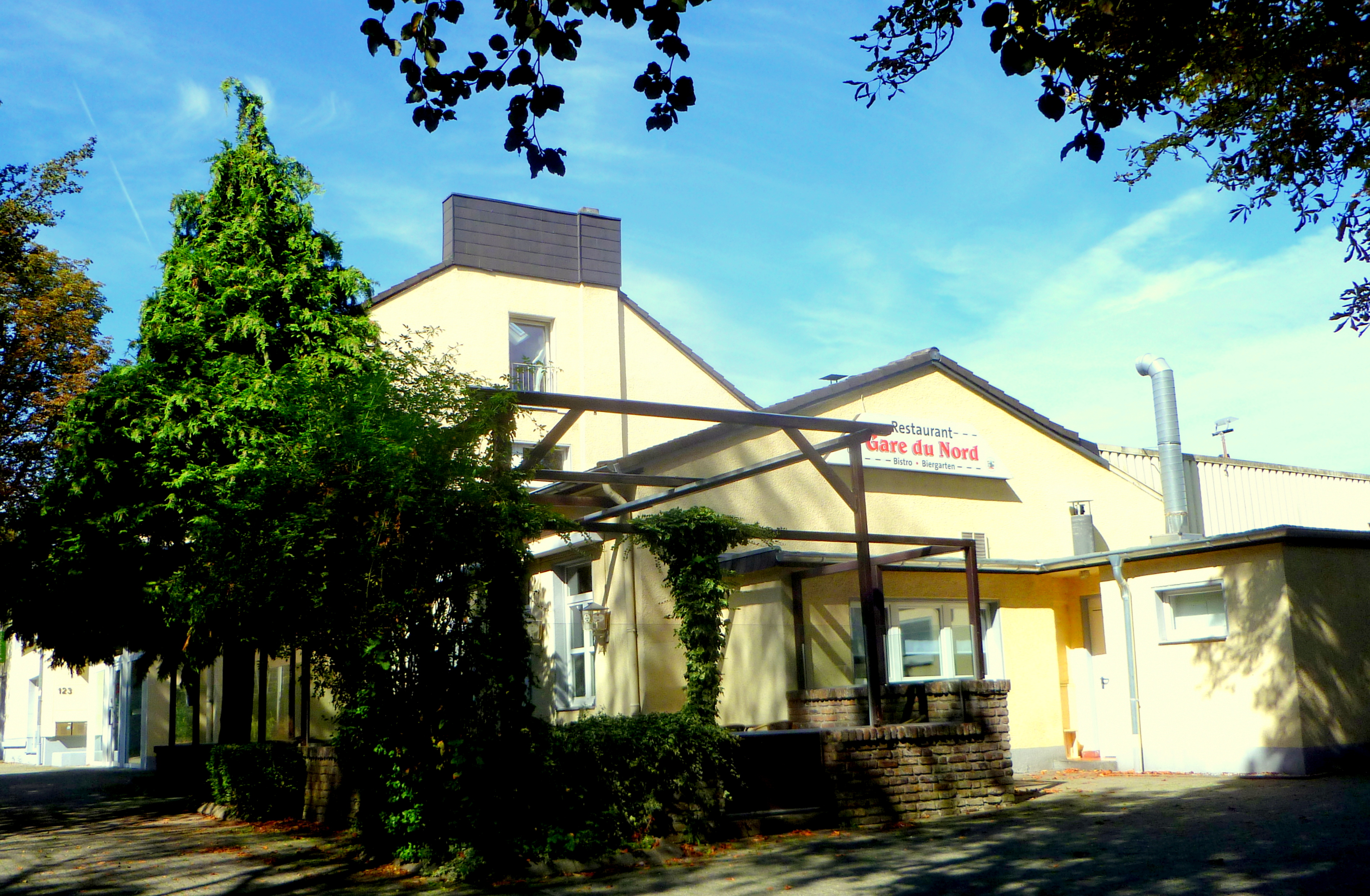 ehemaliger Nordbahnhof Aachen